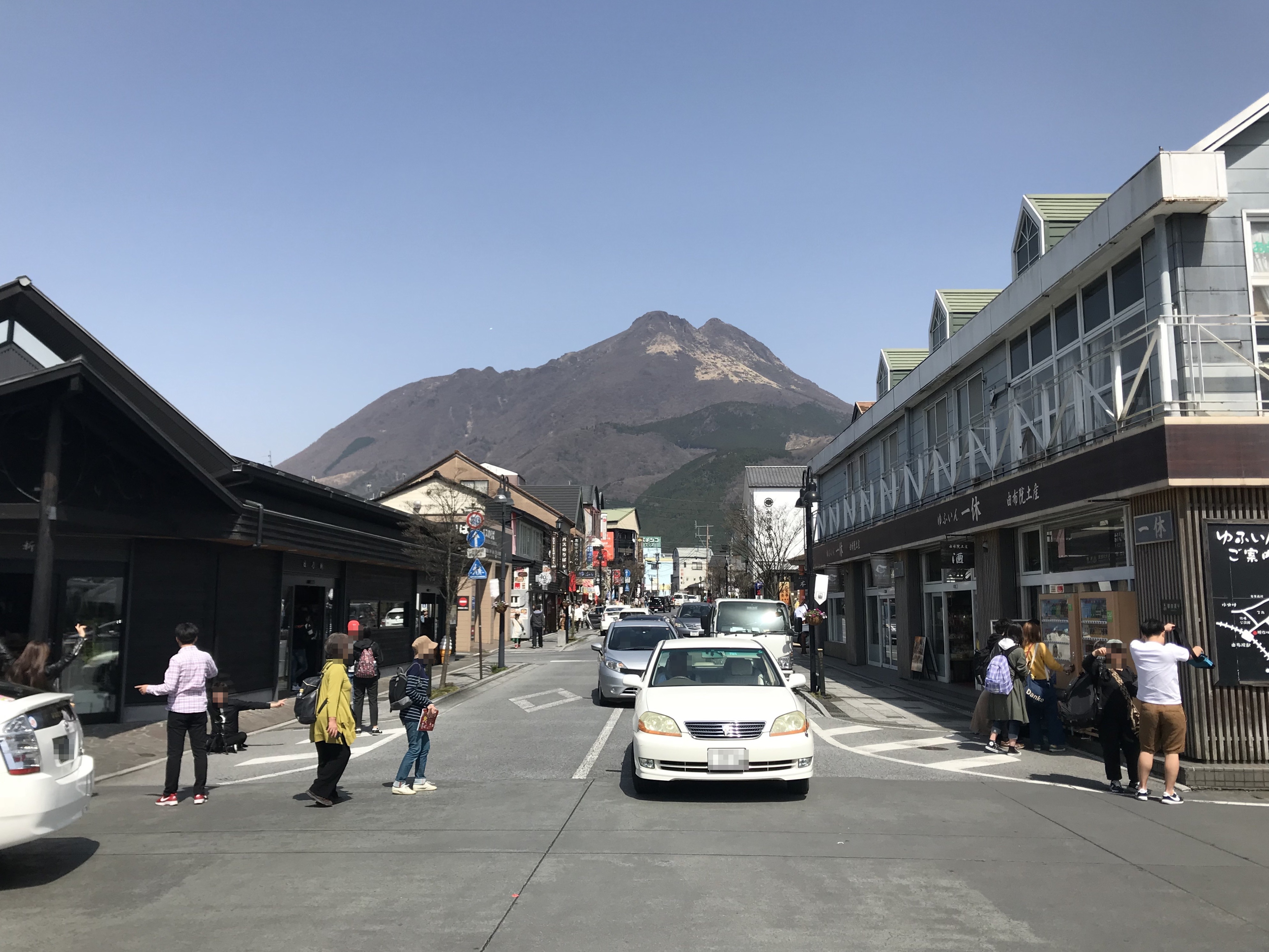 由布院駅前より望む由布岳と由布見通り